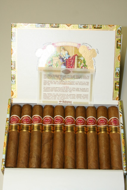 Taken by me.